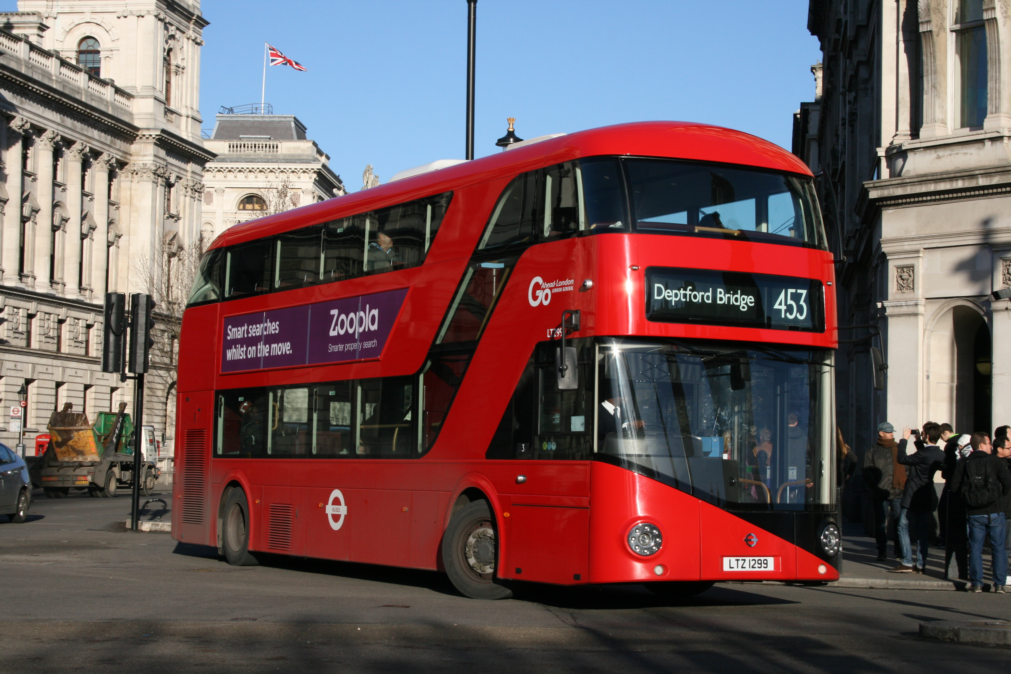 LTZ1299